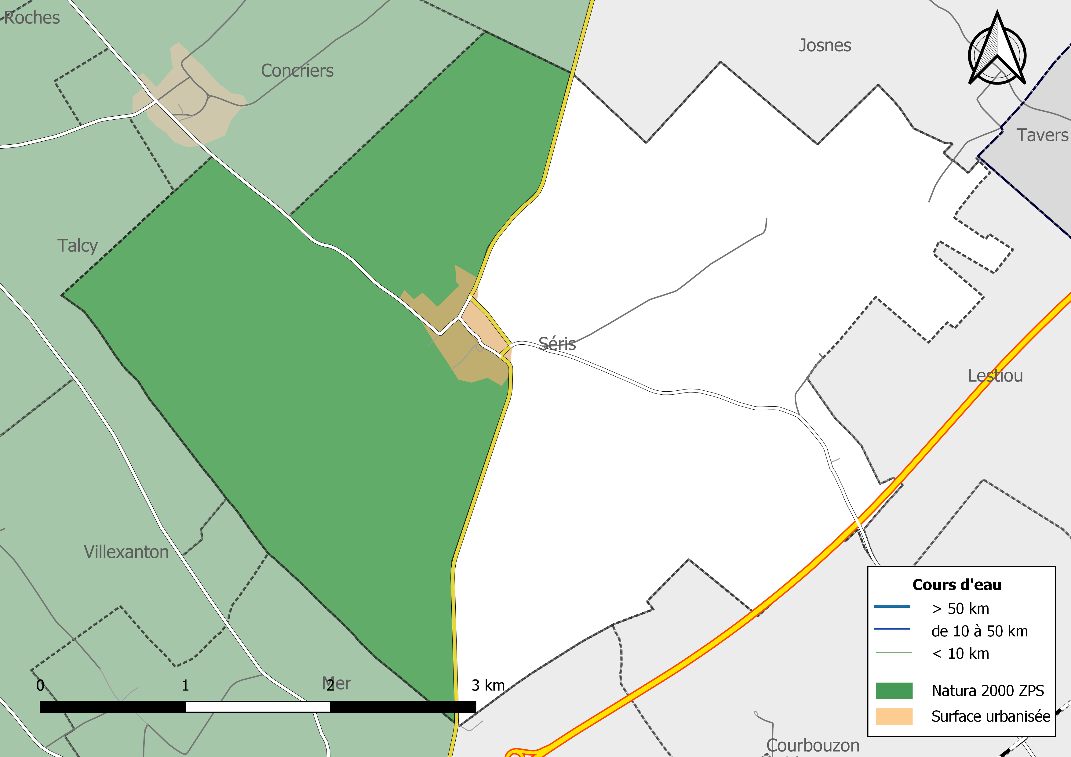 Carte du site Natura 2000 de type ZPS de la commune de Séris (France).